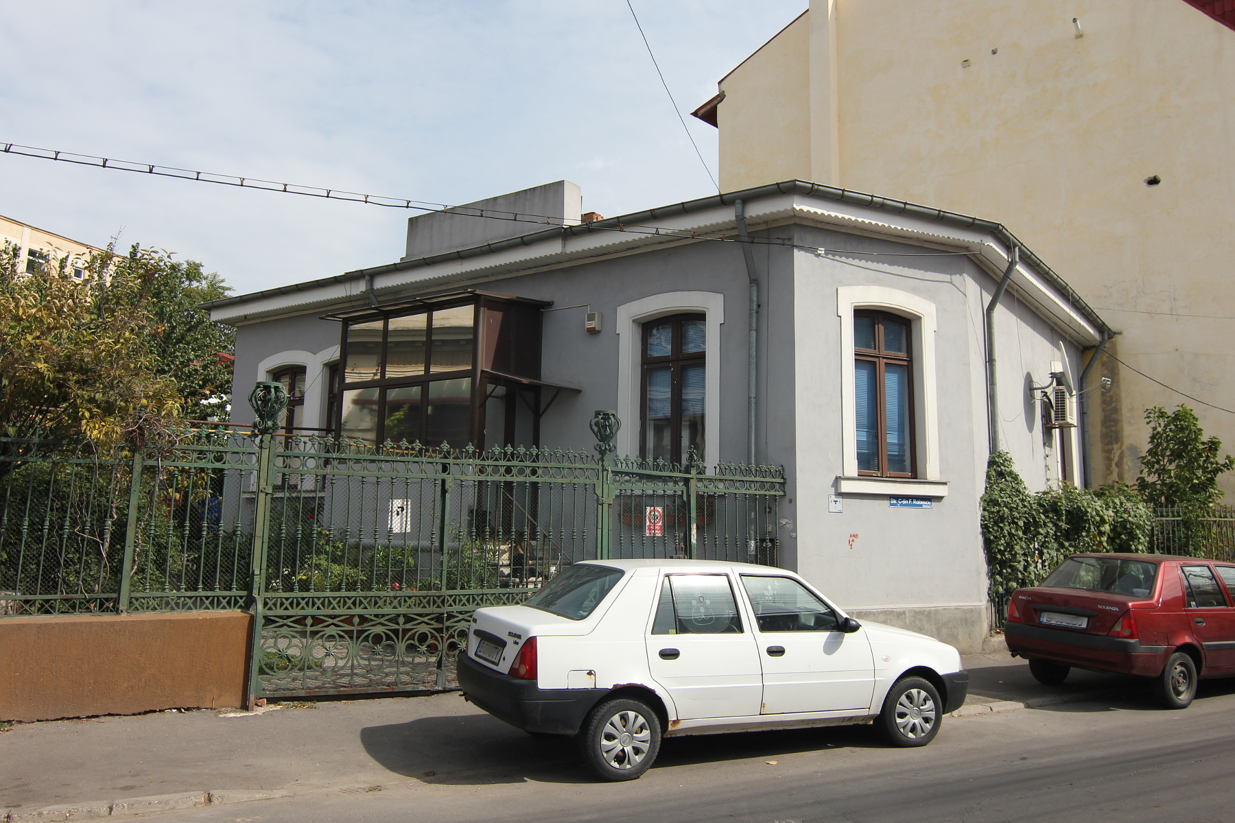 Casă pe Str Robescu